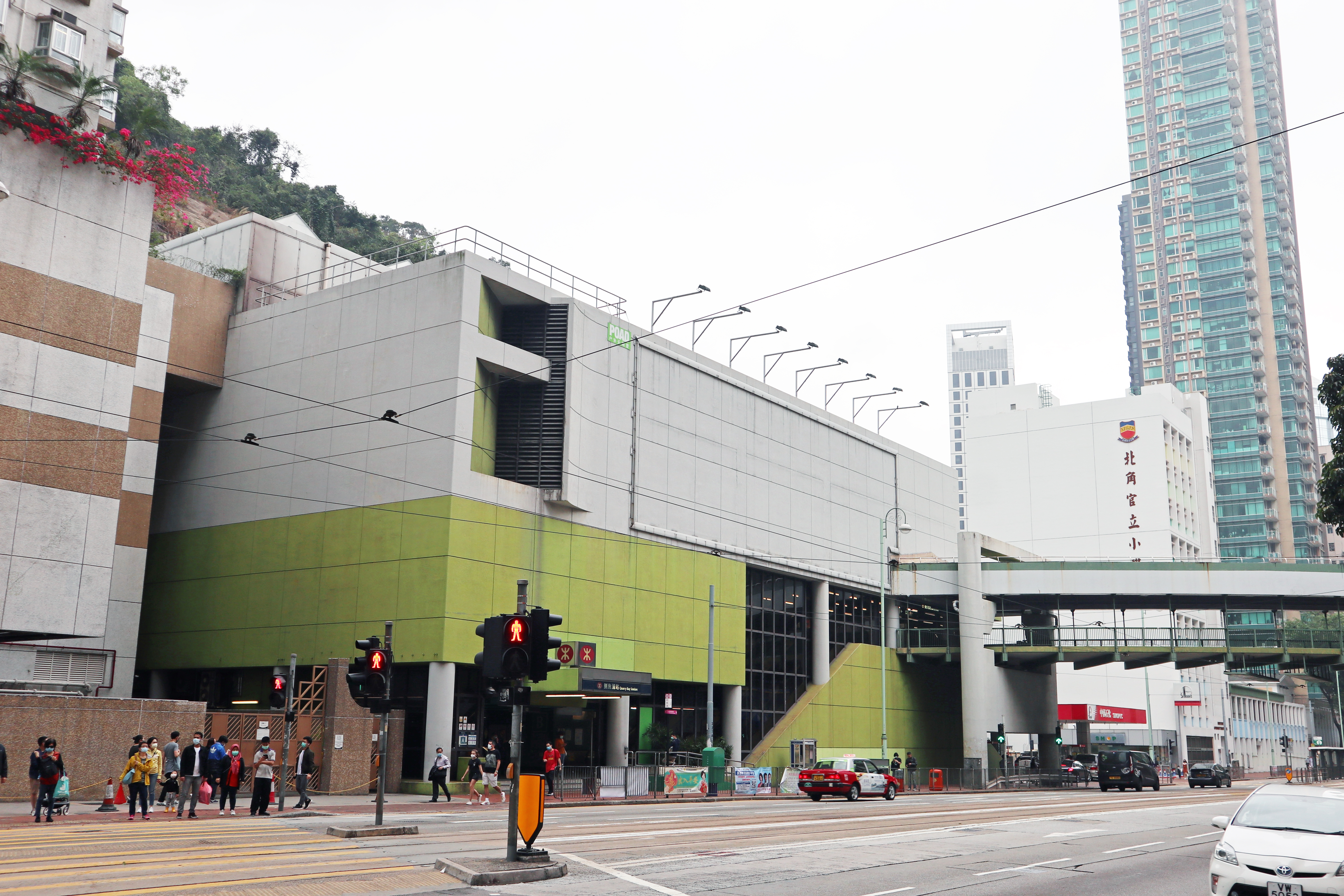 港鐵鰂魚涌站A出入口外觀